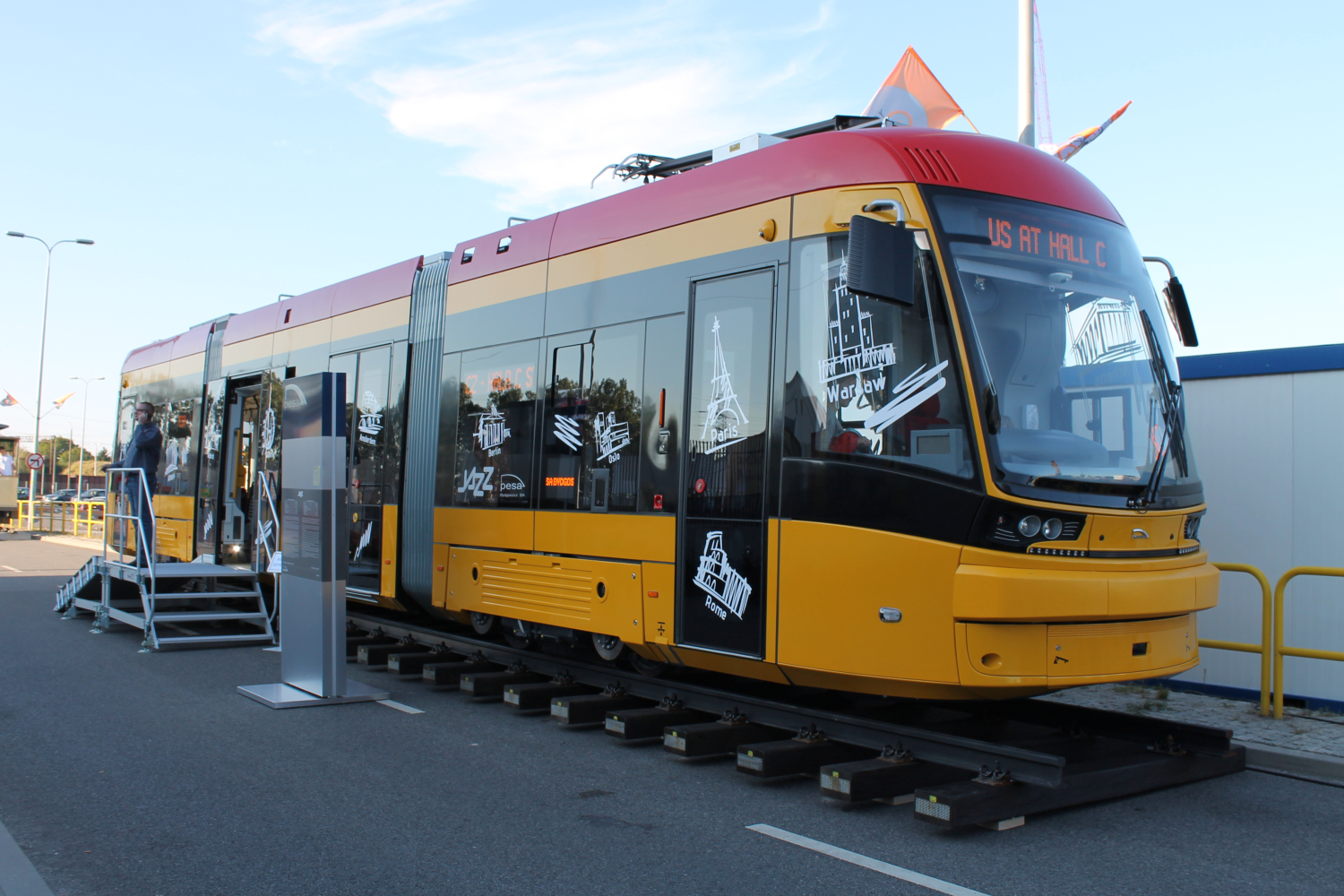 Tramwaj Pesa Jazz 134N-3804 podczas targów Trako 2015. The making of this document was supported by Wikimedia Polska Association, within Wikigrant no. WG 2015-34. English | polski | +/−